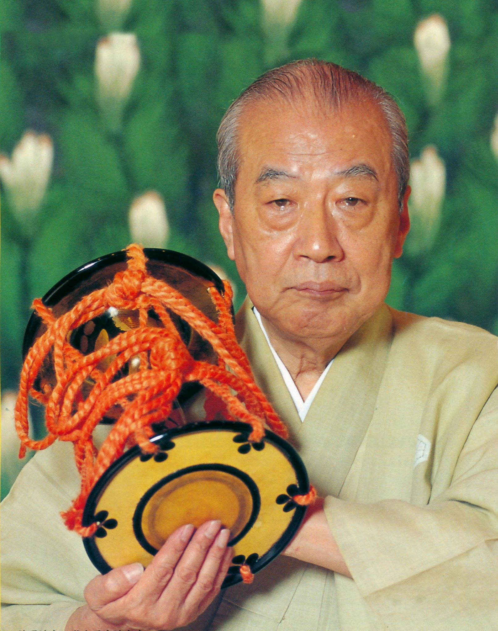 福井四郎兵衛と鼓が写っています